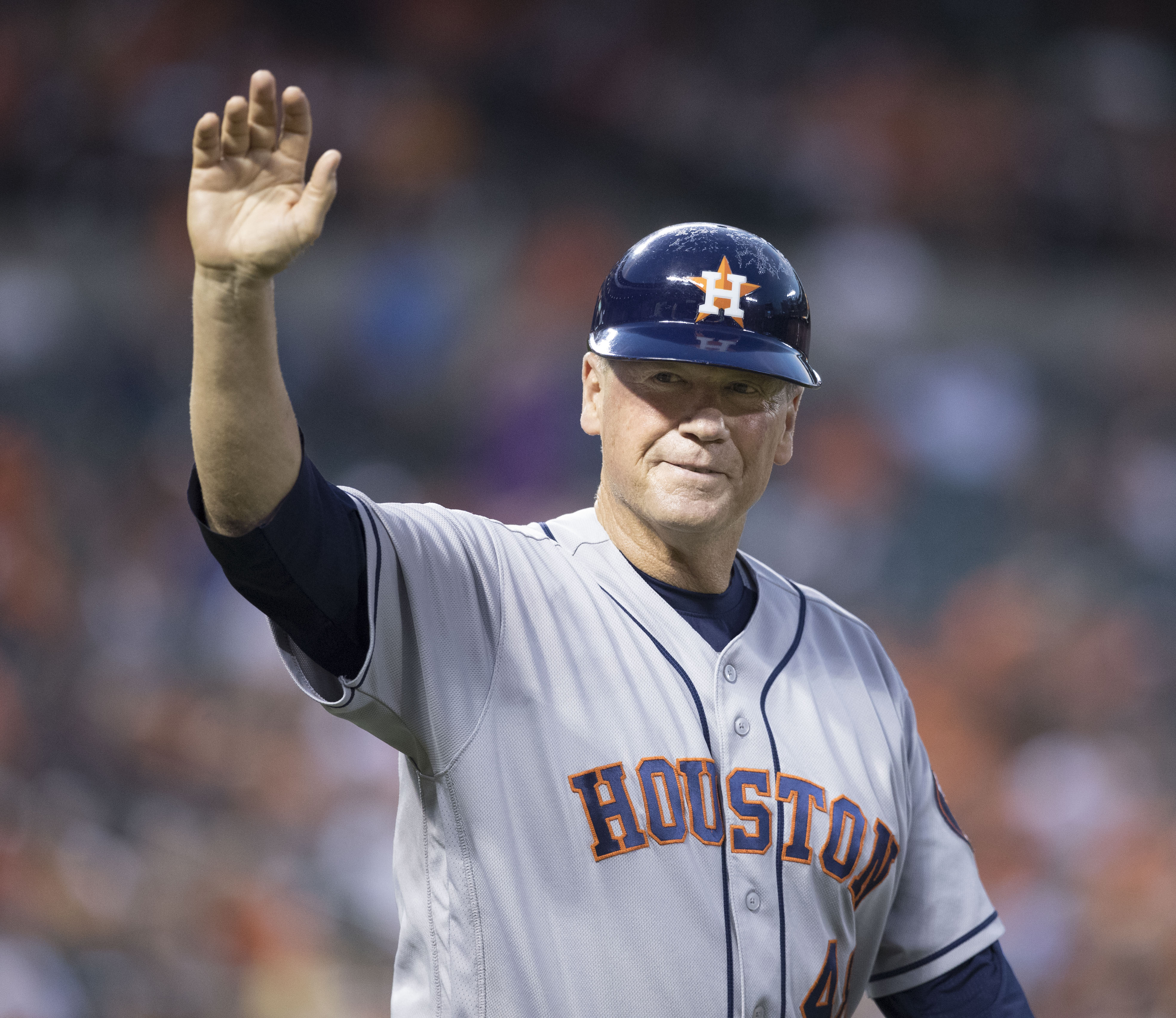 Rich Dauer